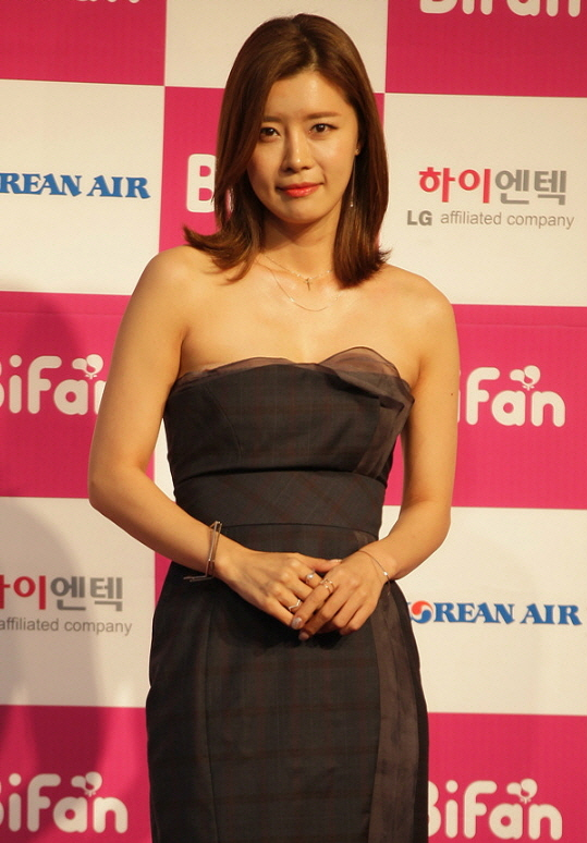 제19회 부천국제판타스틱영화제 폐막식 레드카펫